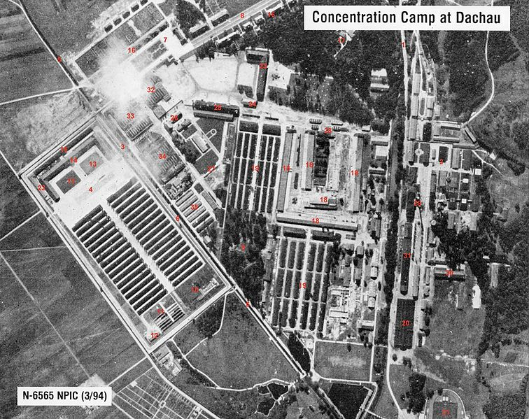 Vista aerea del campo di concentramento di Dachau , dove Rascher tenne la maggior parte dei suoi esperimenti.